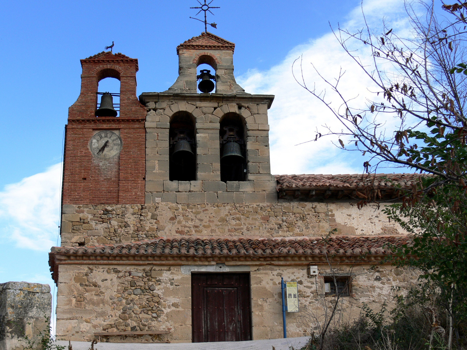 Iglesia de San Román en Morales, aldea de Corporales (La Rioja - España).